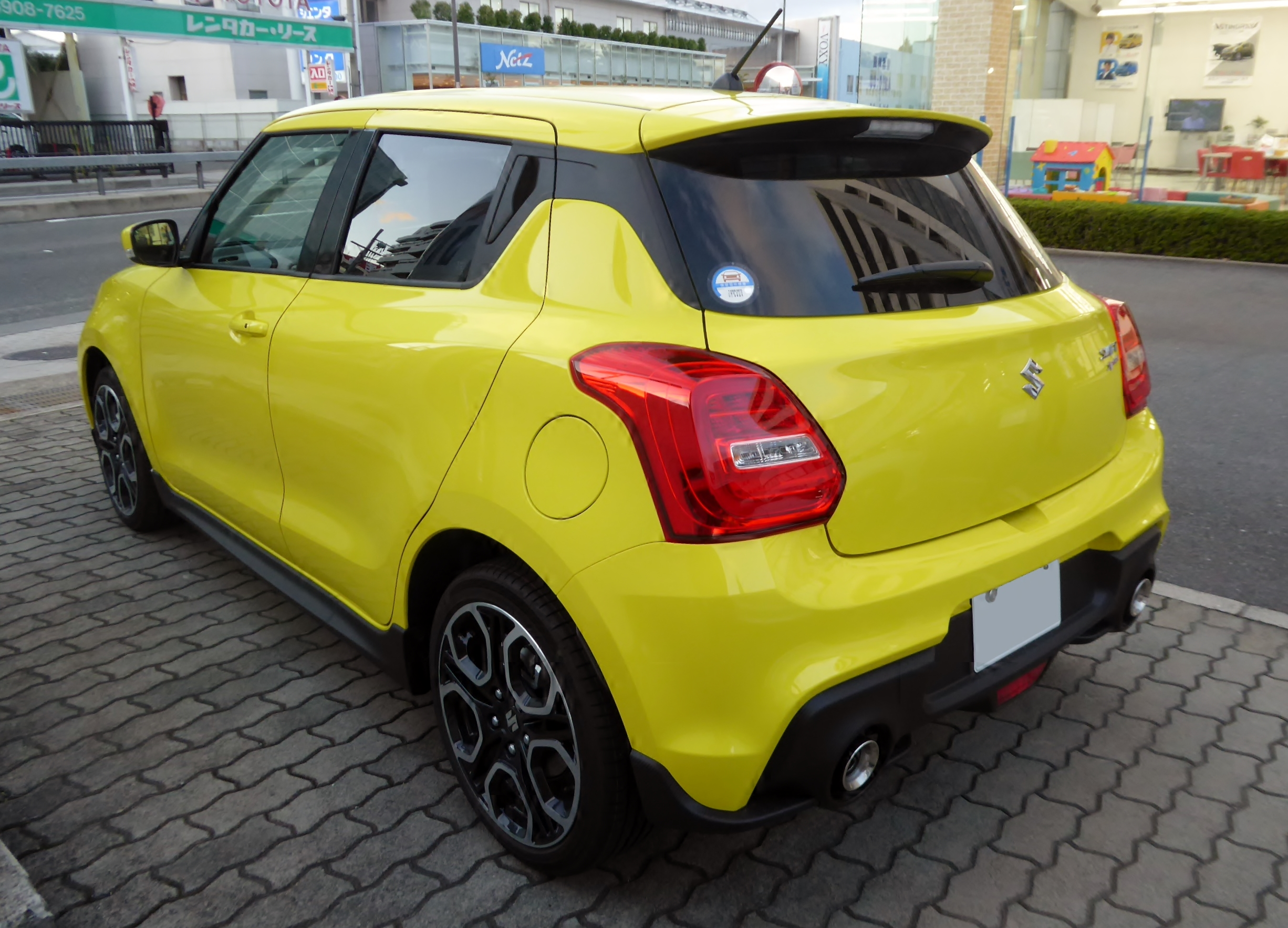 CBA-ZC33S-VBRM-J型スズキ・スイフトスポーツをリアから撮影。